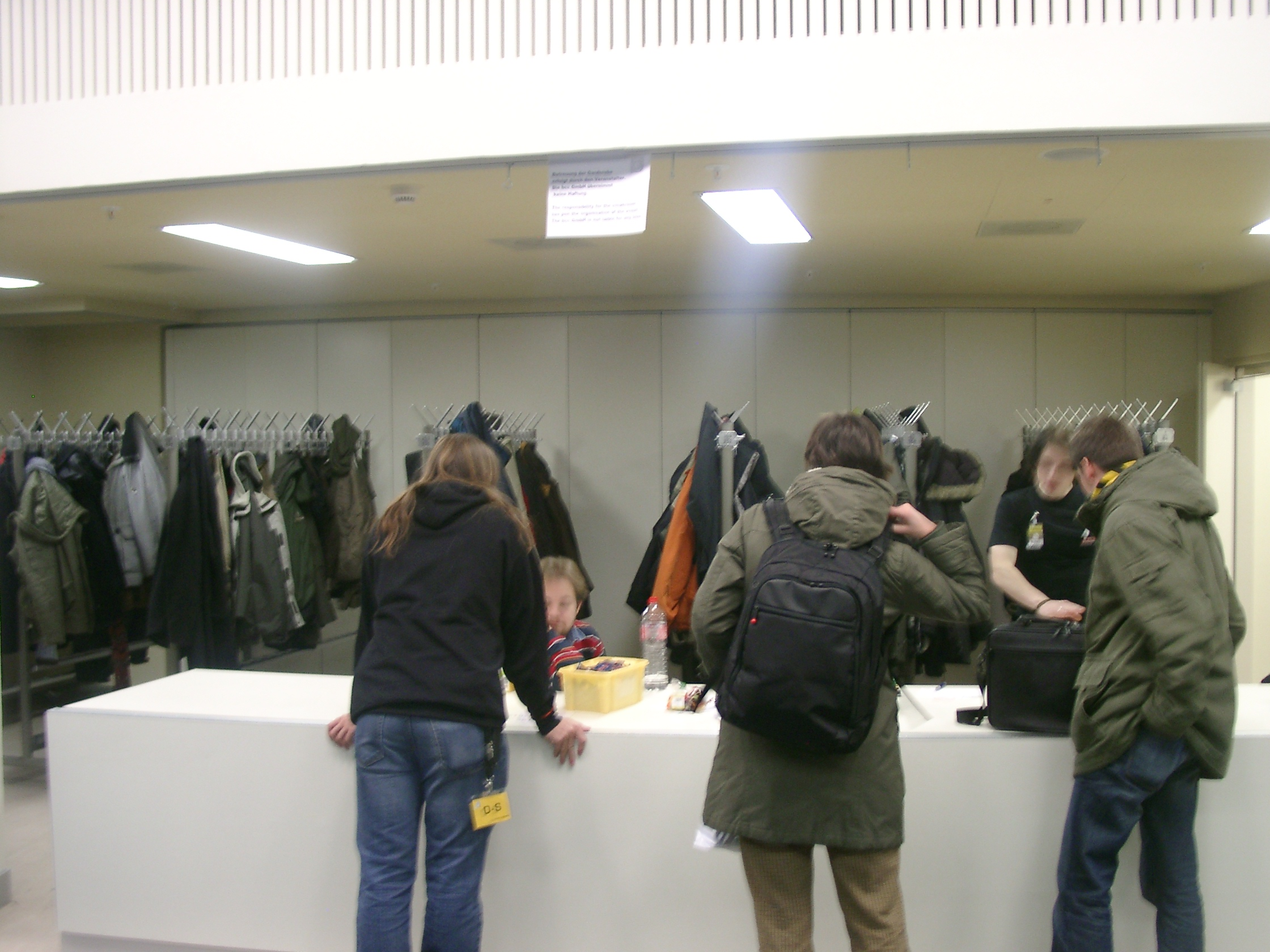 23C3: Szatnia 23C3: Coat-check, cloakroom, Berliner Congress Centrum (BCC), Alexanderplatz, Berlin, Germany 23C3: Garderobenannahme, Garderobe im Berliner Congress Centrum, kurz BCC, Alexanderplatz, Berlin, Deutschland.